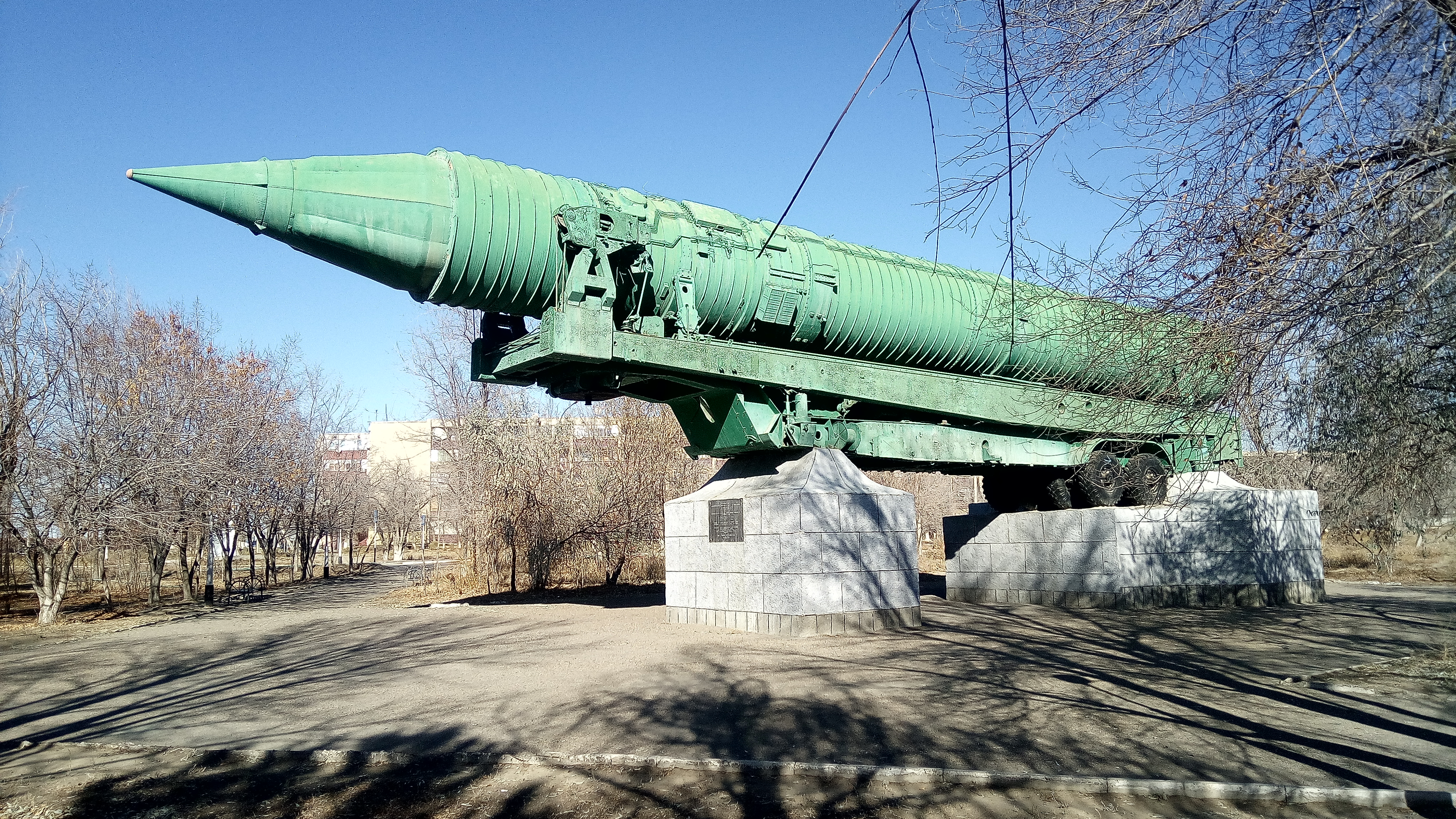 Памятник стратегической ракете 15А15 (Байконур)